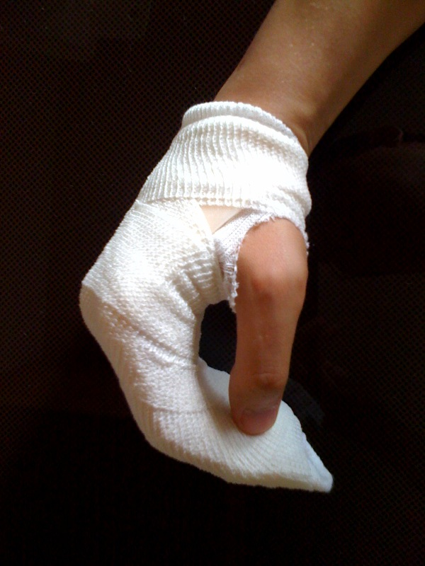 Attelle selon Duran d'une main droite de profil avec immobilisation des doigts sauf le pouce.